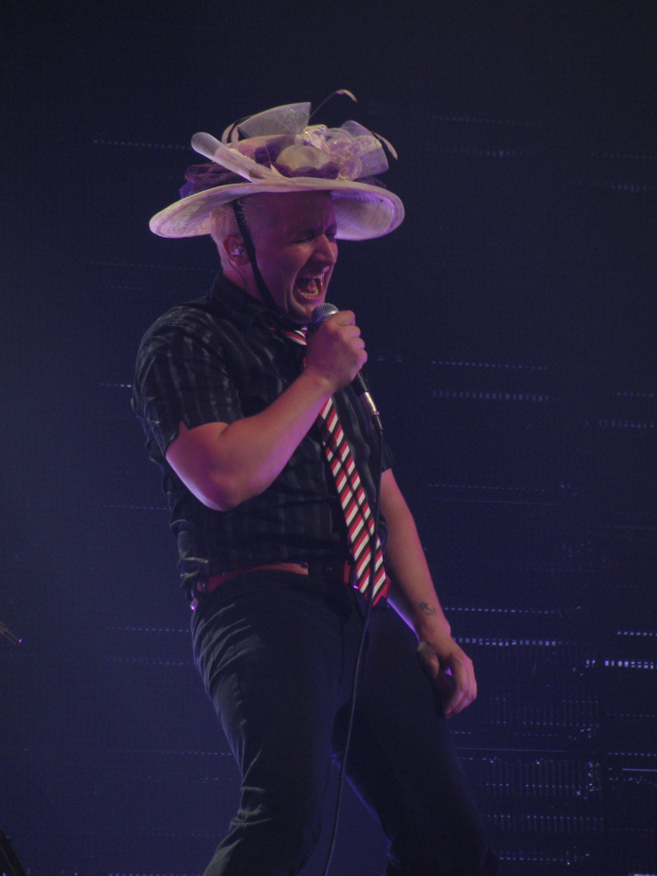 El baterista de Green Day Tré Cool cantando con un inosual look.